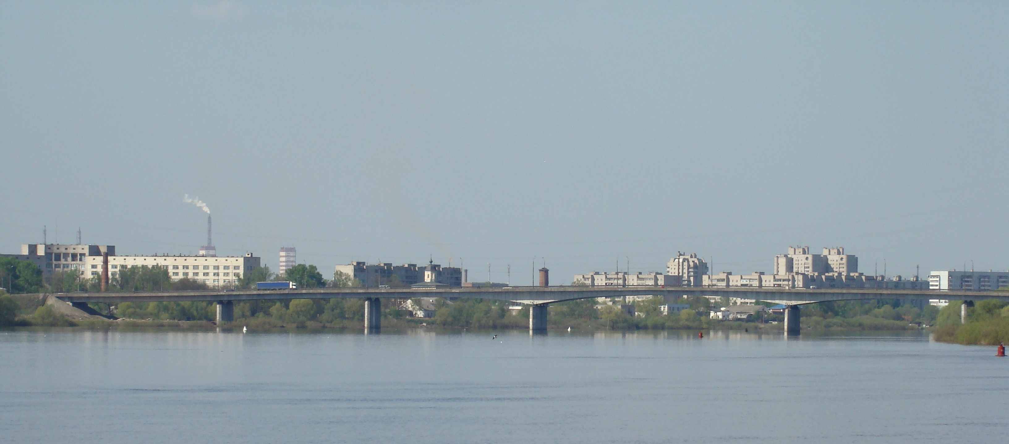 Kolmovsky Bridge (Velikiy Novgorod, Volkhov River)